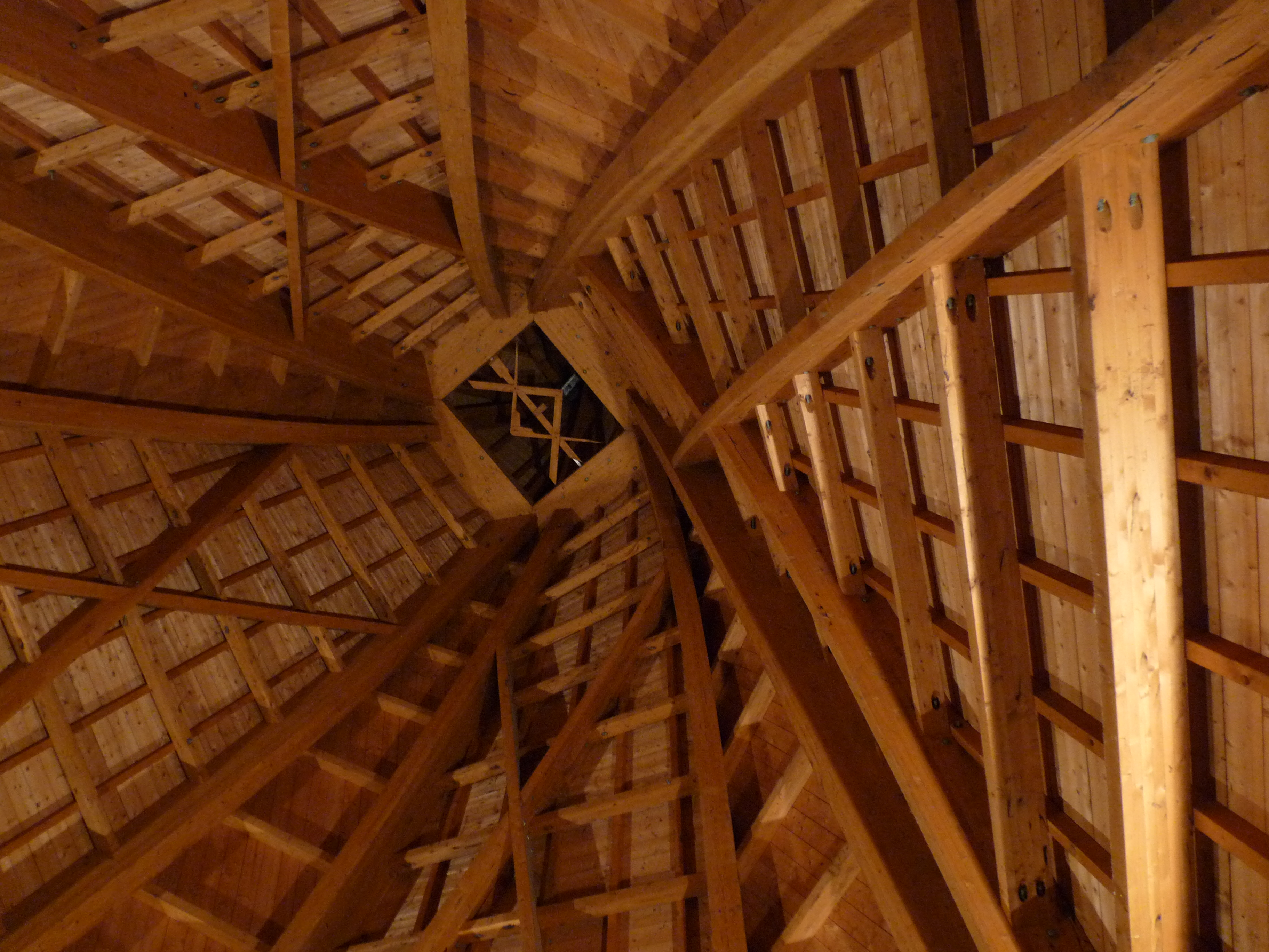 Intérieur du clochers tors de l'église Notre-Dame de Sérignac-sur-Garonne